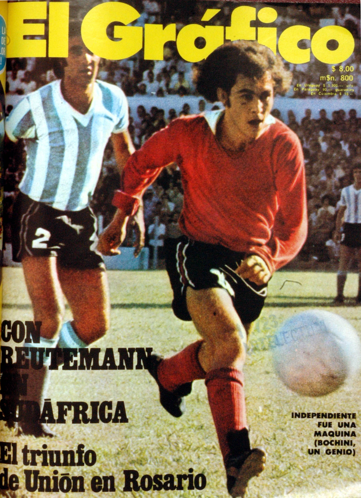 El Grafico del 05 de Marzo de 1975. Edicion 2891